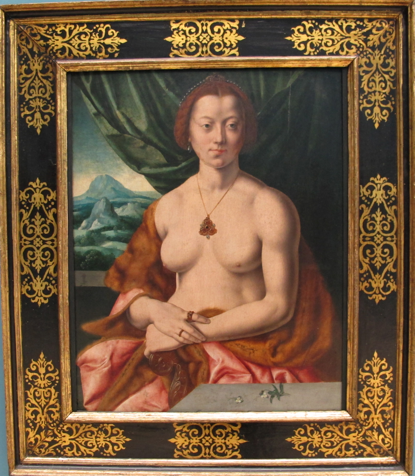 Bartholomäus bruyn il vecchio, ritratto di donna seminuda, colonia, 1535 ca